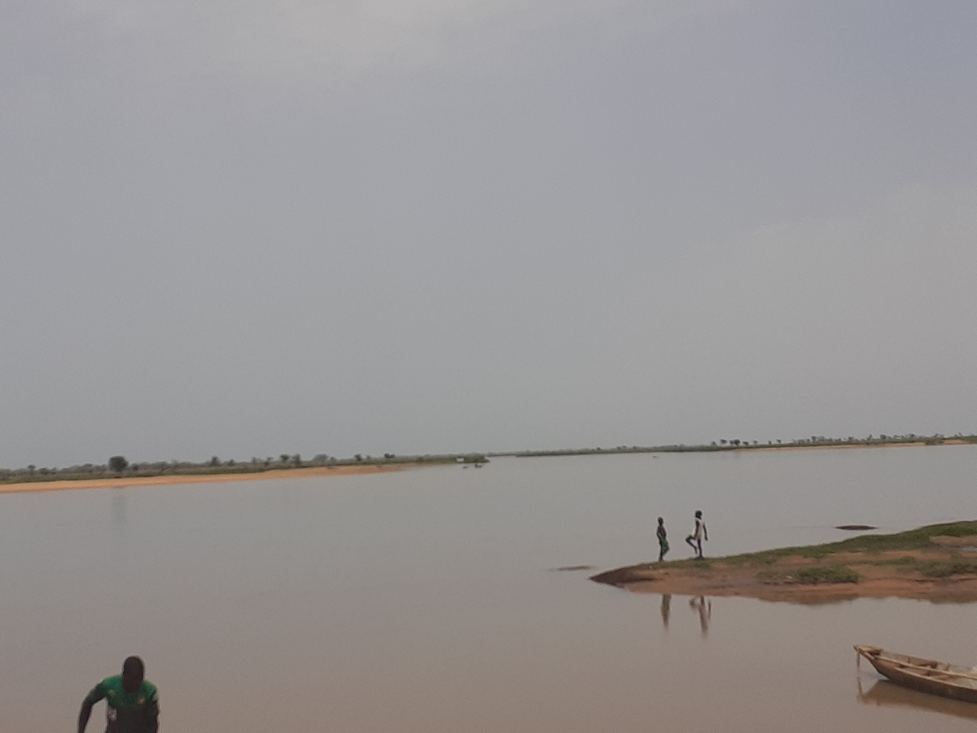 Pêcheurs sur une rive de Zébé Marao zone frontière naturelle Cameroun Tchad